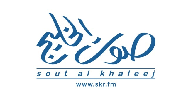 شعار صوت الخليج